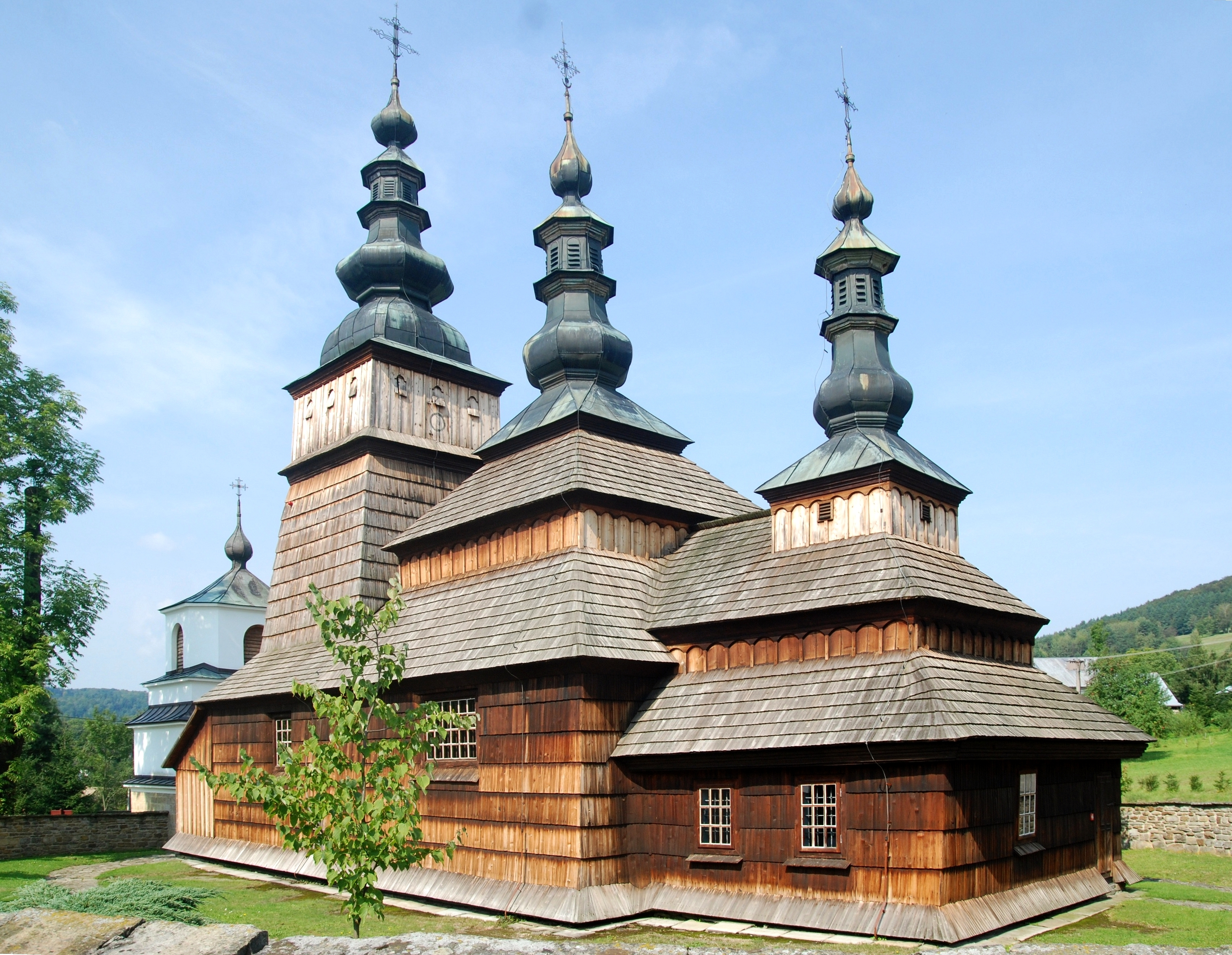 wieś Owczary